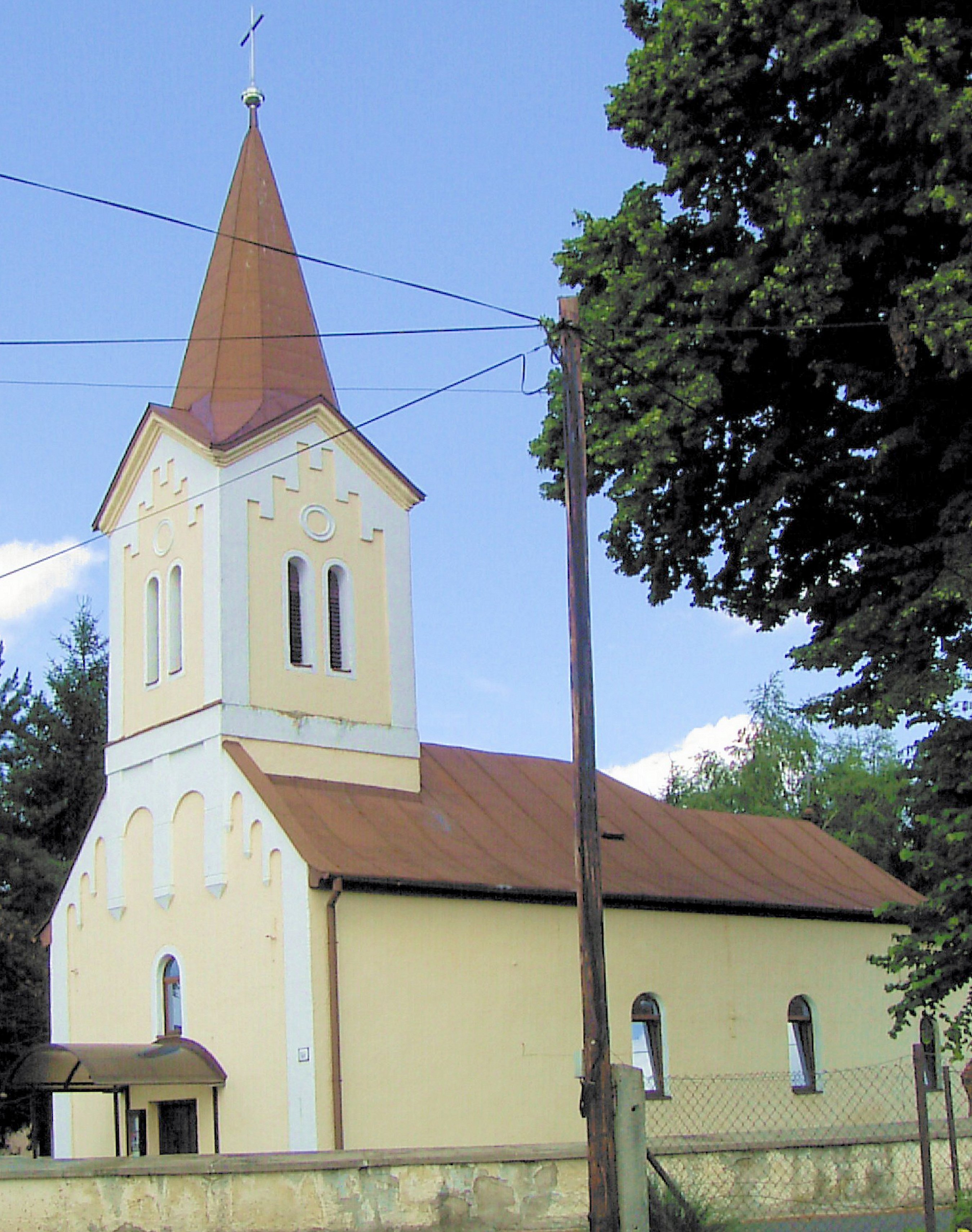 Rímskokatolícky kostol Malá Domaša